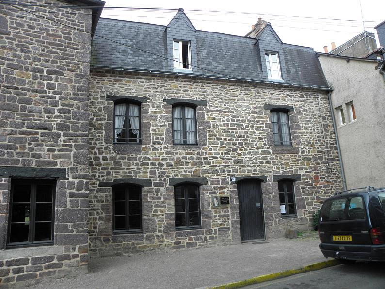 Maison natale de Saint-Louis-Marie-Grignion-de-Montfort au 15 Rue de la Saulnerie à Montfort-sur-Meu (35).